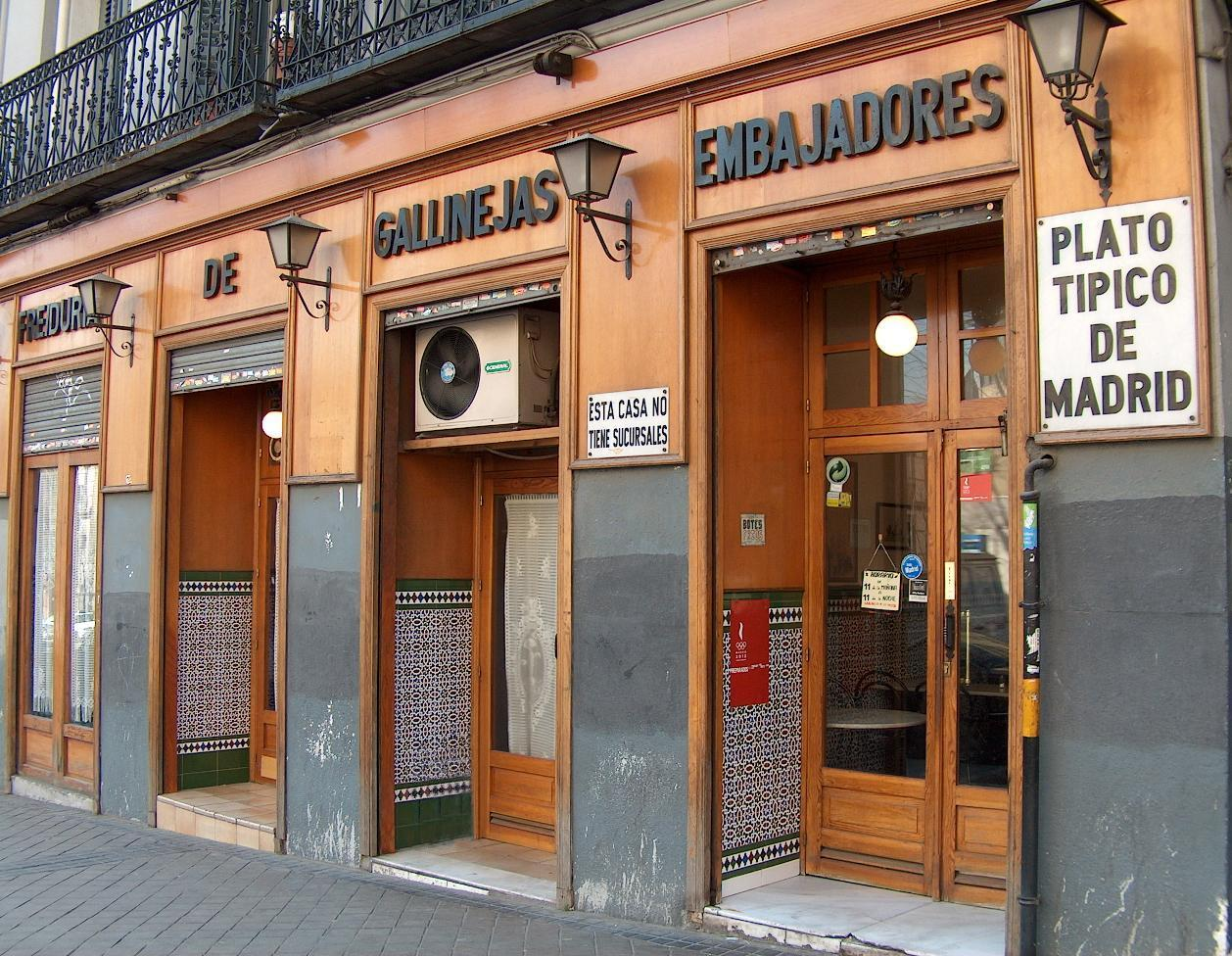 Freiduría de Gallinejas de Embajadores, en la calle homónima de Madrid capital.